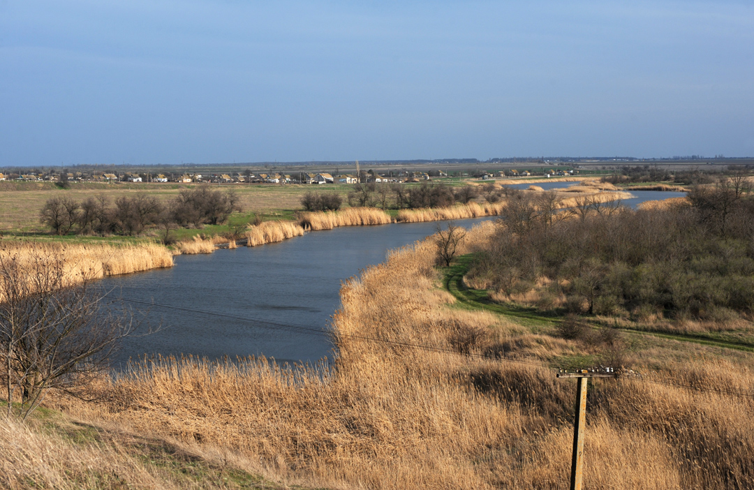 Вид на реку Малый Утлюк и на село Малую Терновку Акимовского района Запорожской области, Украина